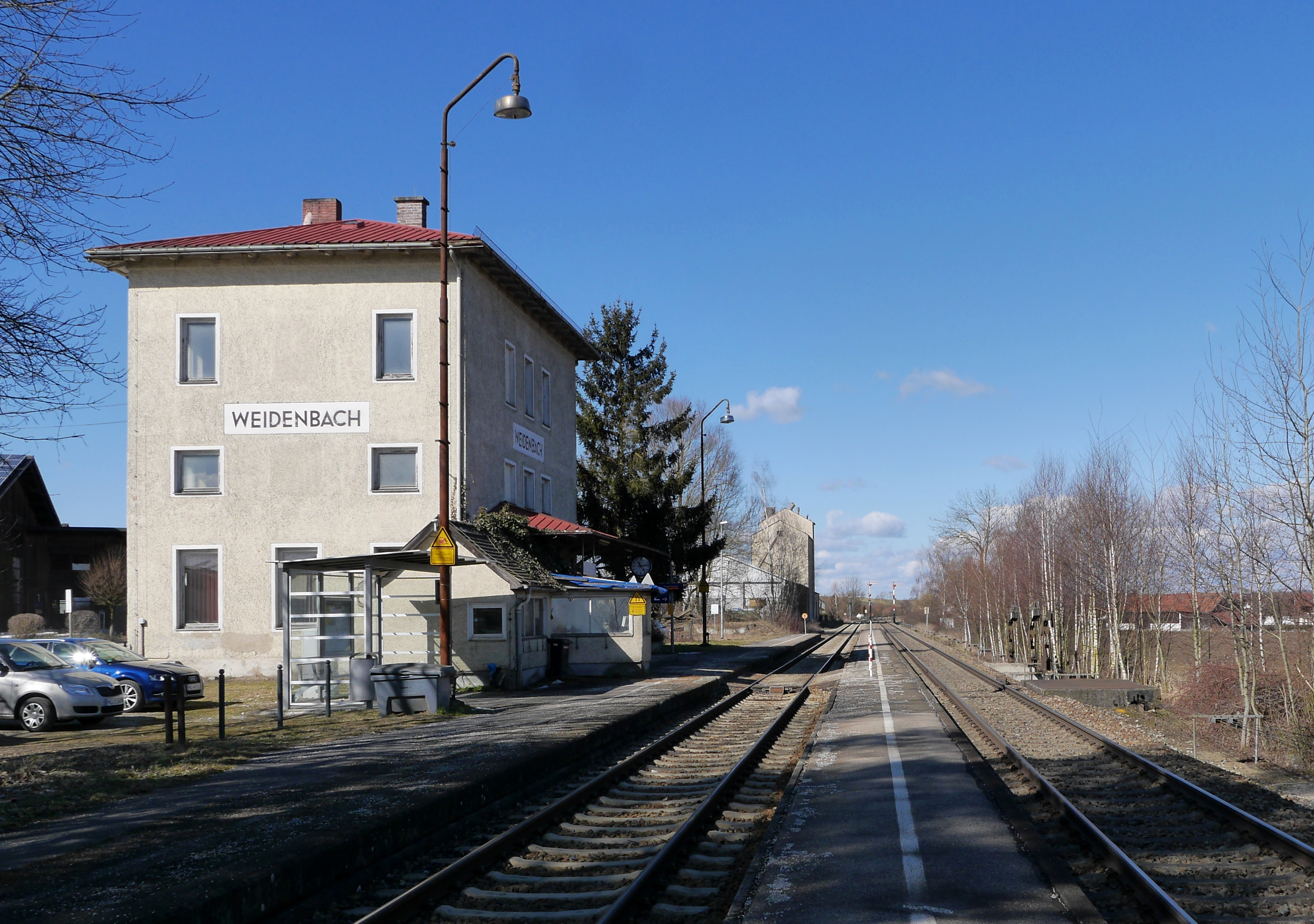 Empfangsgebäude und Bahnsteige des Bahnhofs Weidenbach, Ansicht von Osten